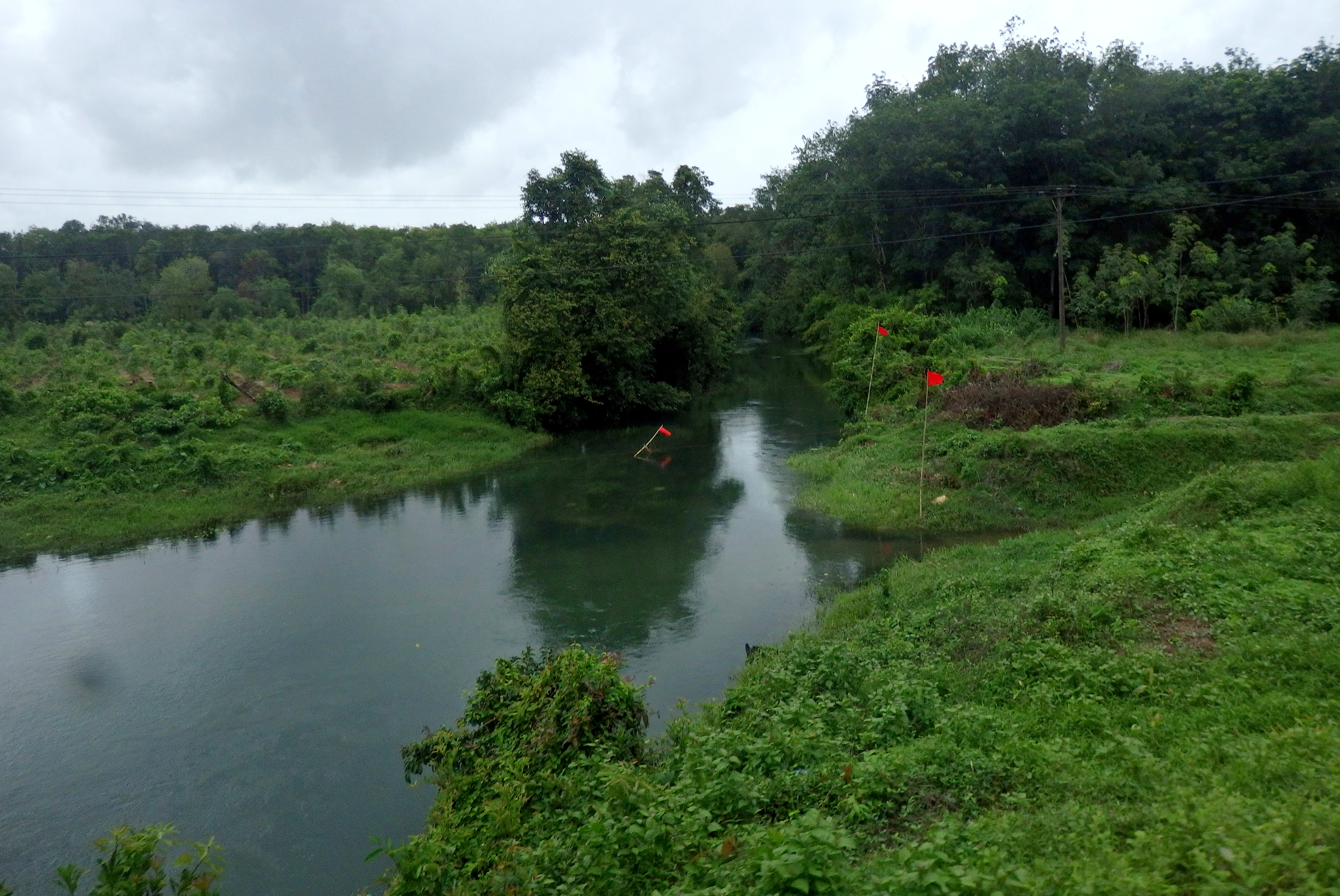 Ka Mar Wet, Myanmar (Burma)